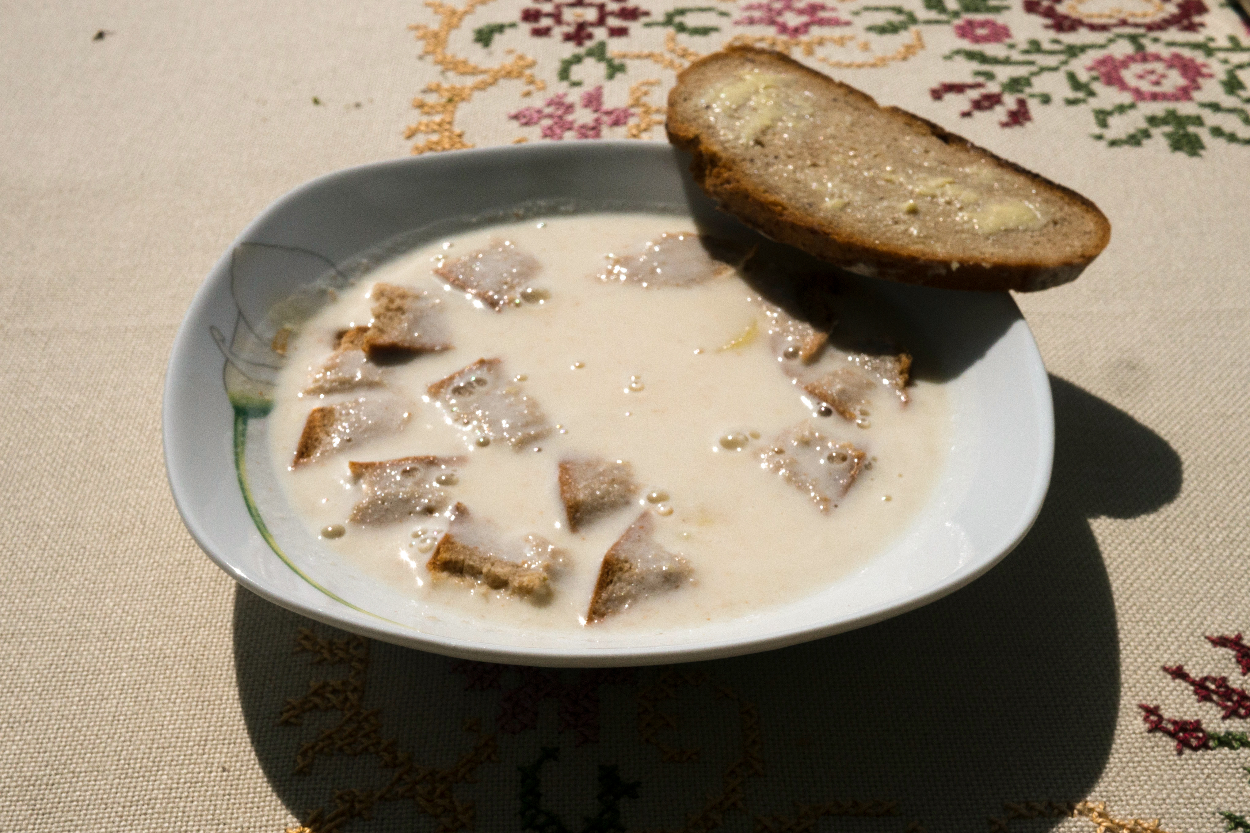 Saure Suppe; Herbstmilchsuppe; Rezept: 1/2 liter milch, 1/8 buttermilch, 1/8 sauerrahm, 4 löffel mehl, brot 'schnittl', kartoffeln (vorher gegart)